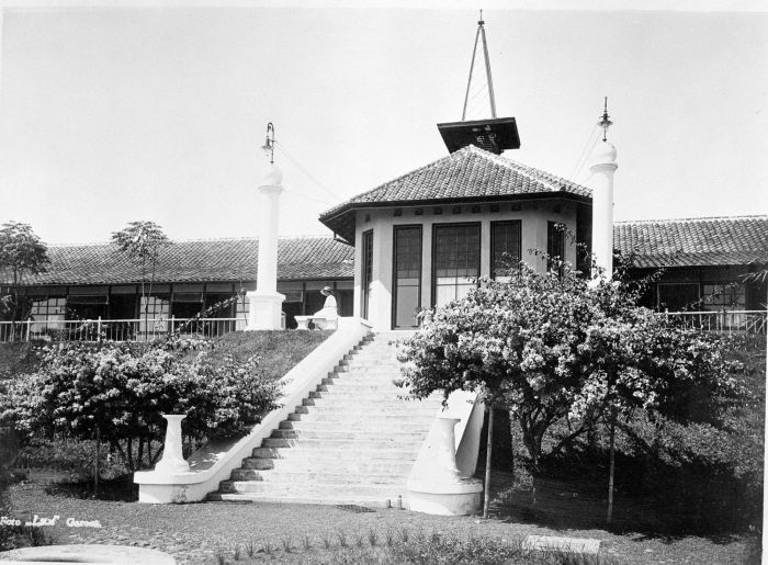 Foto. Monumentale trap naar bordes van het sanatorium te Garoet.